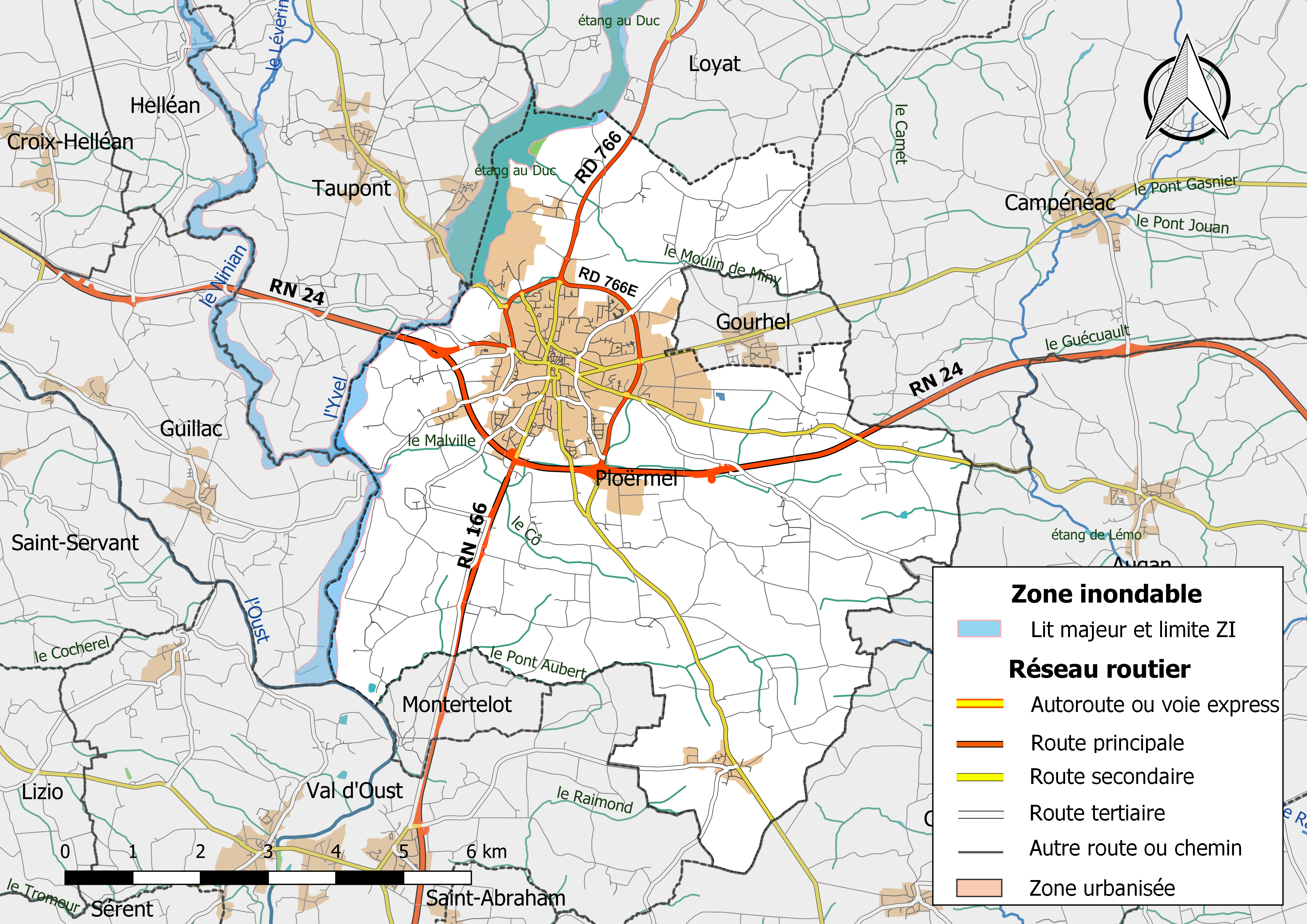 Carte des zones inondables de la commune de Ploërmel (France).